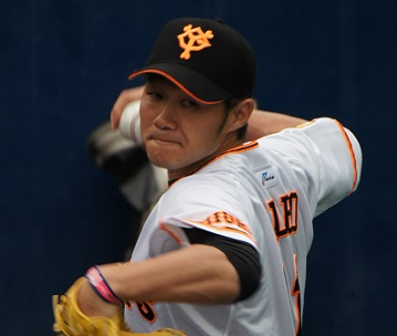 Giants kubo 11